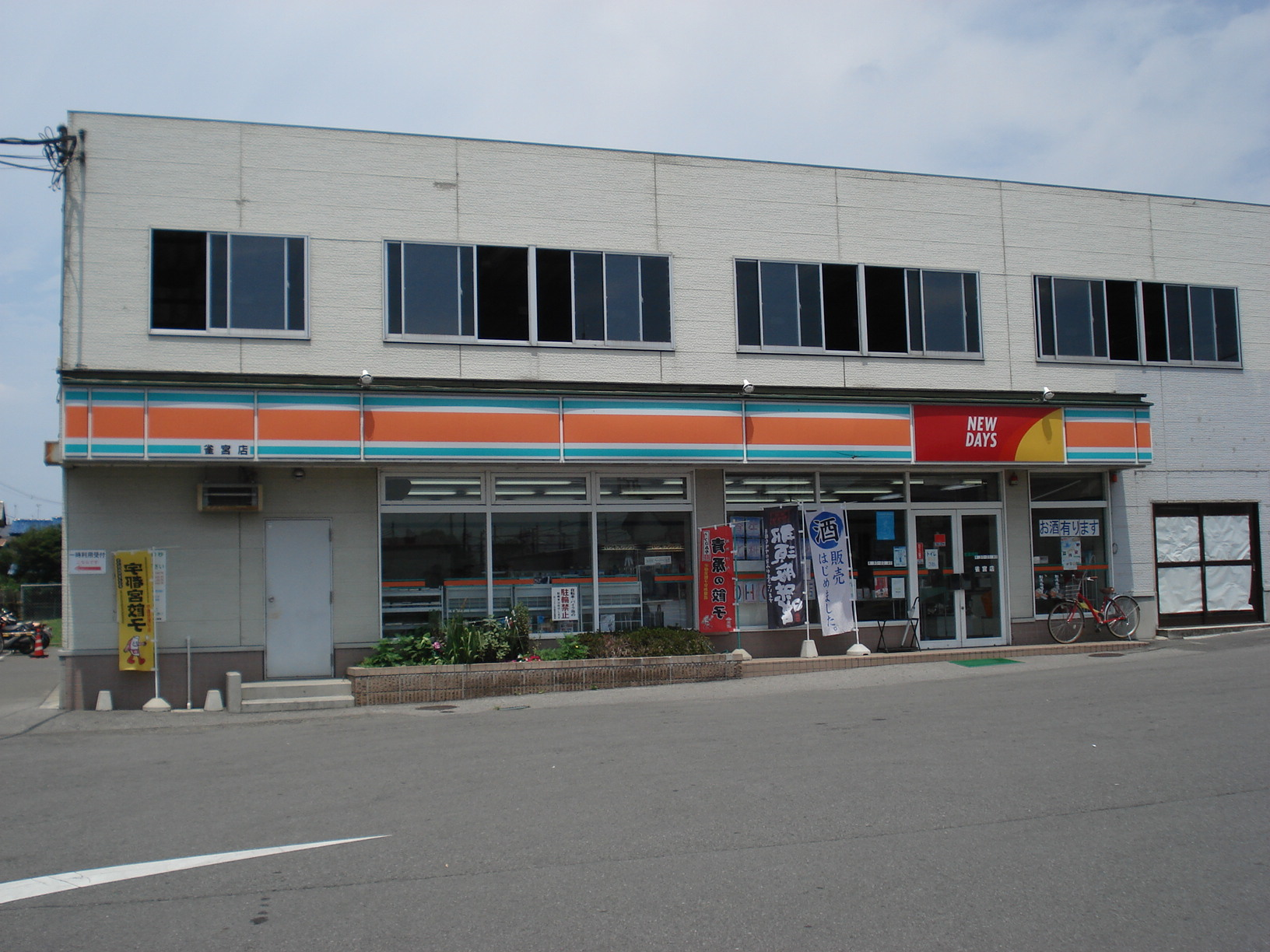 NEWDAYS雀宮店（栃木県宇都宮市）